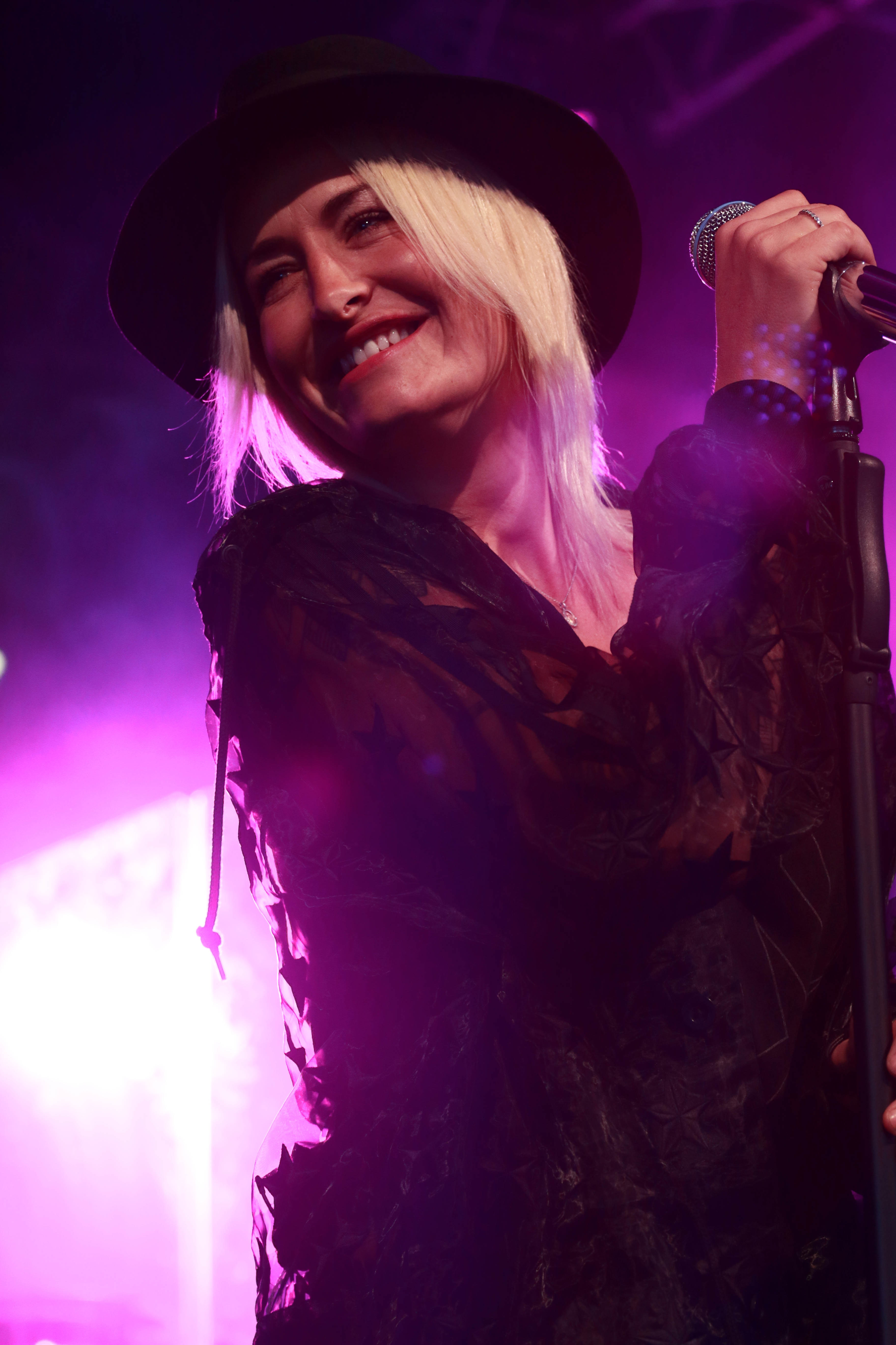 Sarah Connor bei den Gerry Weber Open 2015